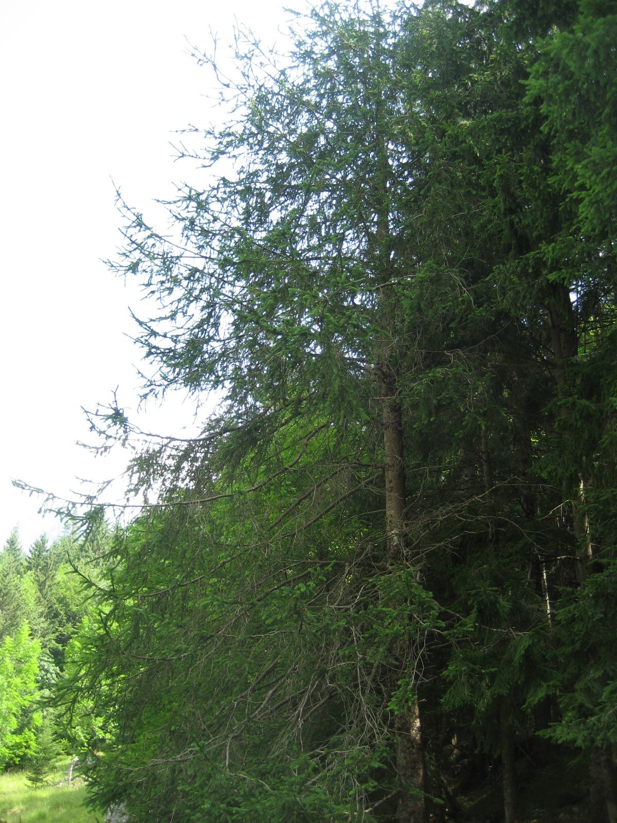 Kačasta smreka v Trenti (Picea abies f. virgata)